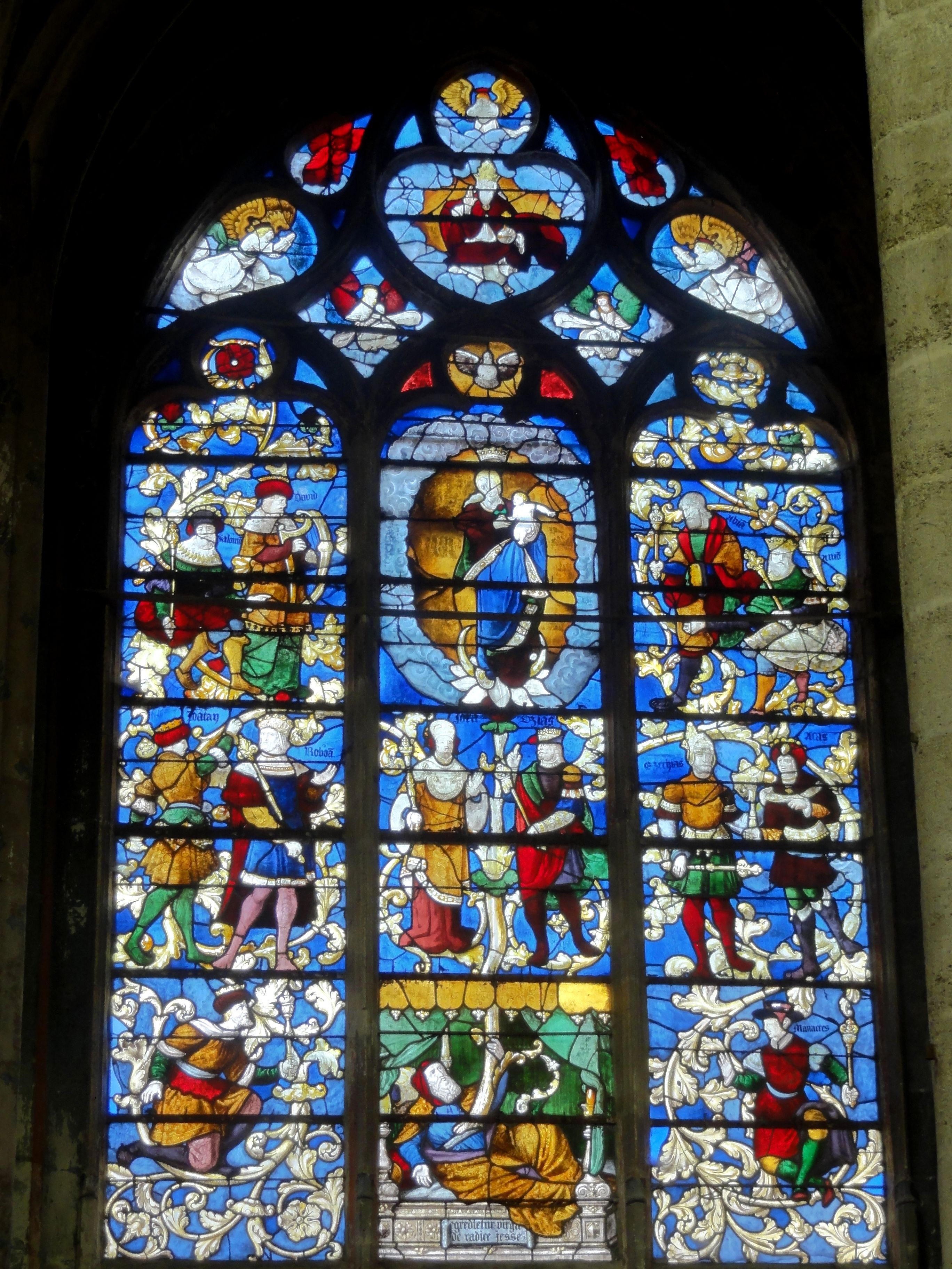 Vitrail n° 11 - arbre de Jessé.